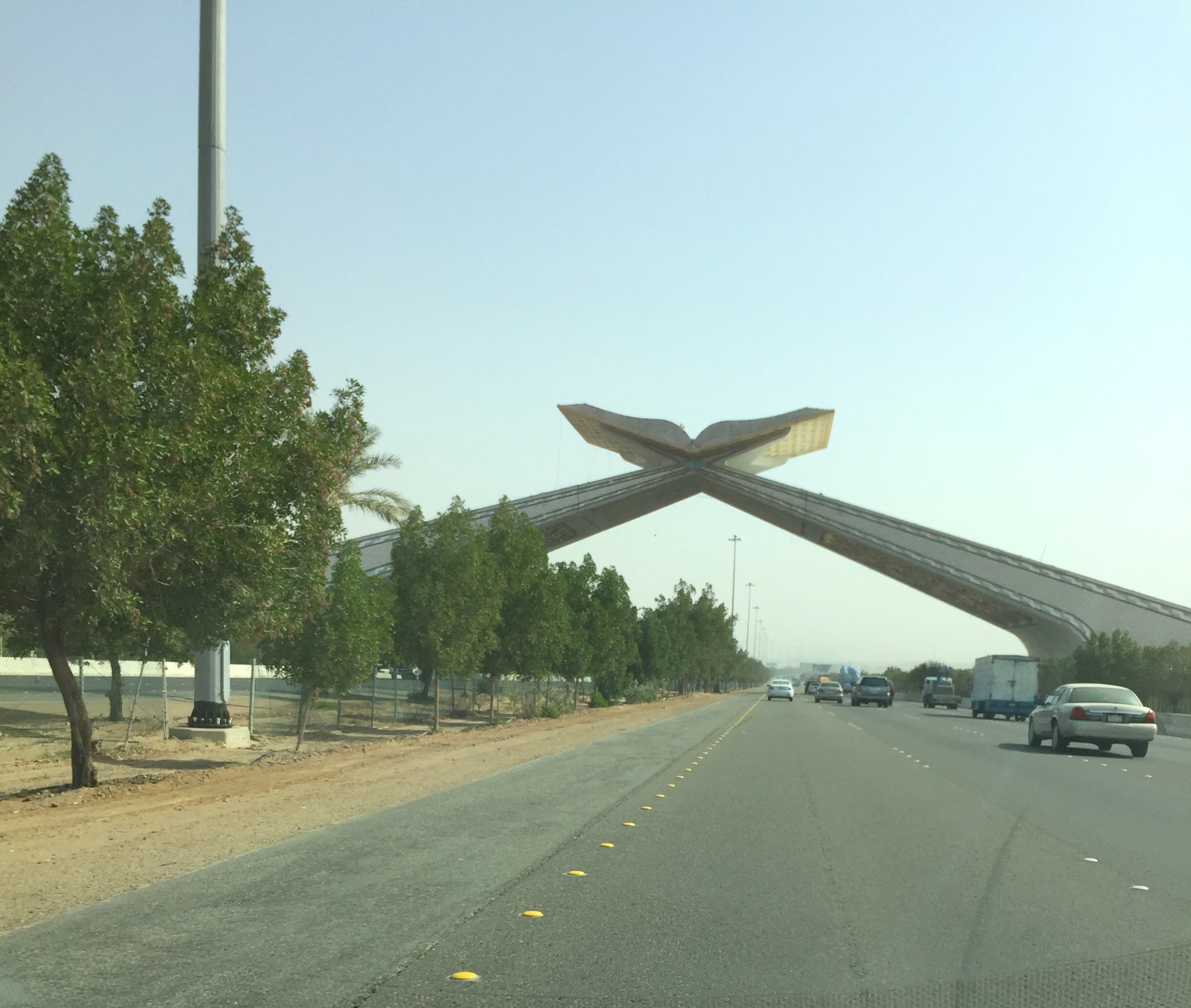 مدخل مدينة مكة المكرمة